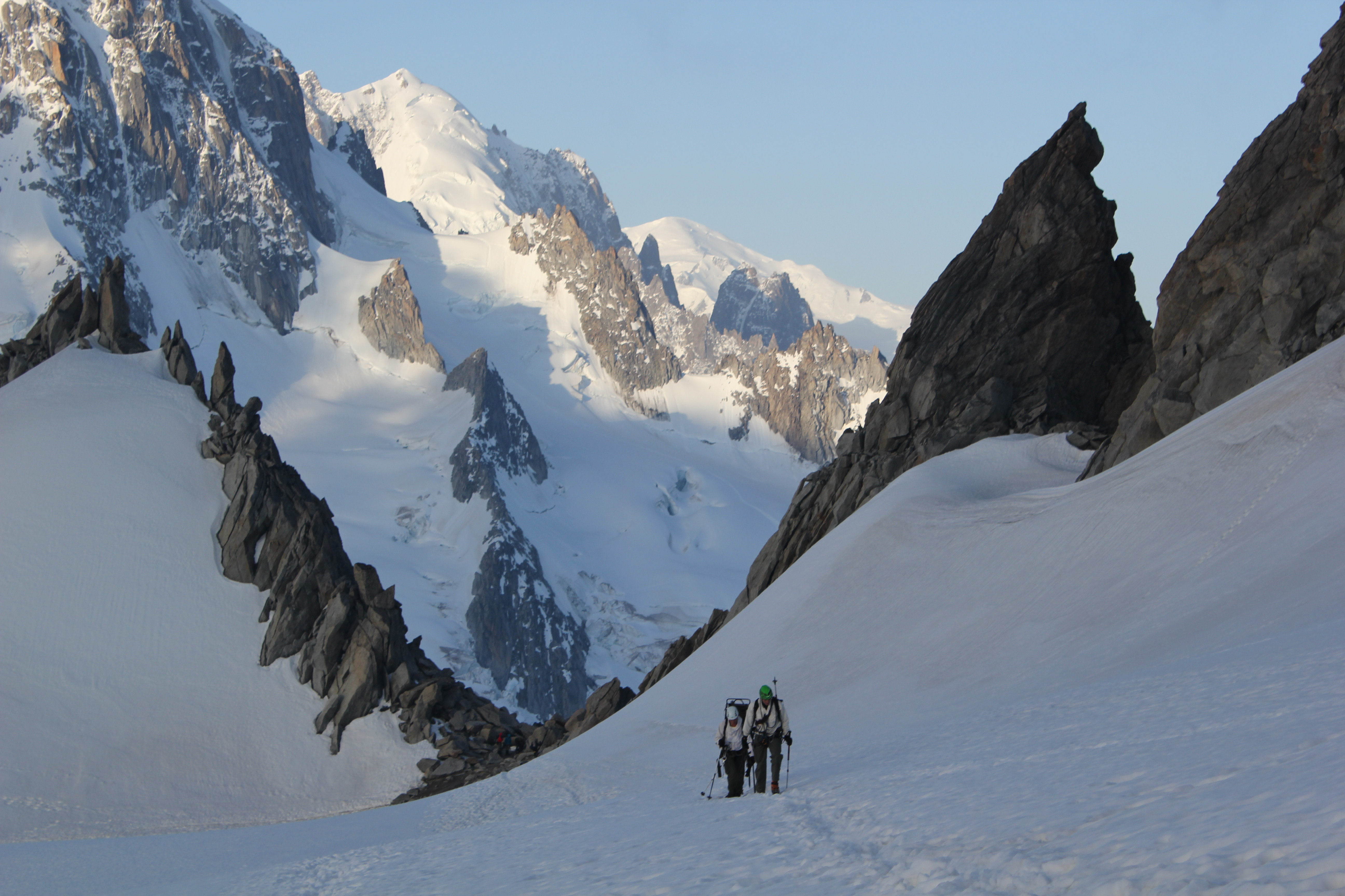 Chasseurs Alpins en exercice sur le Glacier du Trient